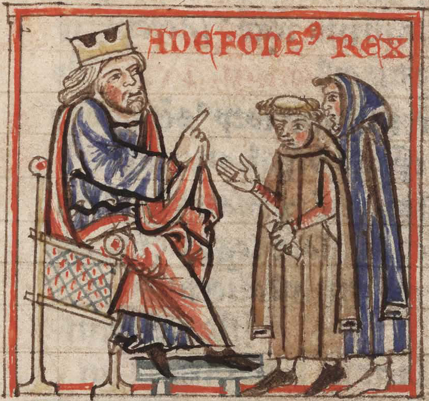 Alfonso VI de Castilla en una miniatura del manuscrito 1513 de la Biblioteca Nacional de España, folio 67 vuelto. Representa una escena del Chronicon regum legionensium del obispo Pelayo en la que Alfonso VI, alcanzado el poder, se apresura a enviar legados al papa Gregorio VII para solicitar la incorporación de la iglesia española al rito romano en 1076, todo ello según la particular visión histórica del obispo de Oviedo. ALONSO ÁLVAREZ, Raquel, «El obispo Pelayo de Oviedo (1101-1153): historiador y promotor de códices iluminados», Semata. Ciencias Sociais e Humanidades, 2010, vol. 22, págs. 334-335 y 339. ISSN 1137-9669